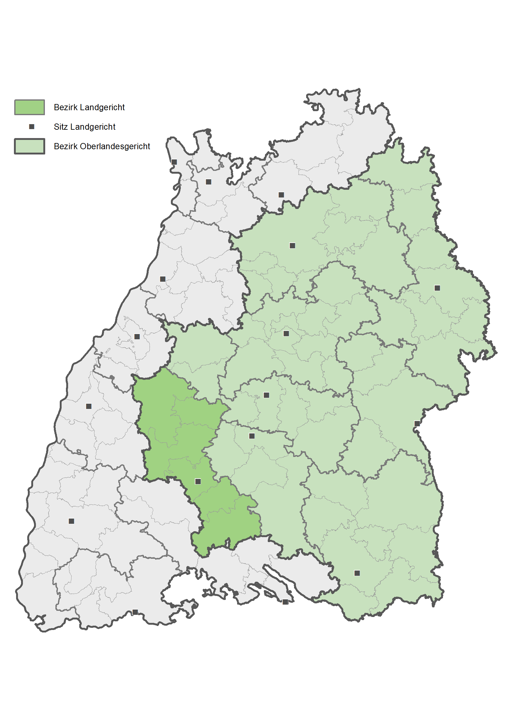 Karte des Bezirks des Landgerichts Rottweil in Baden-Württemberg